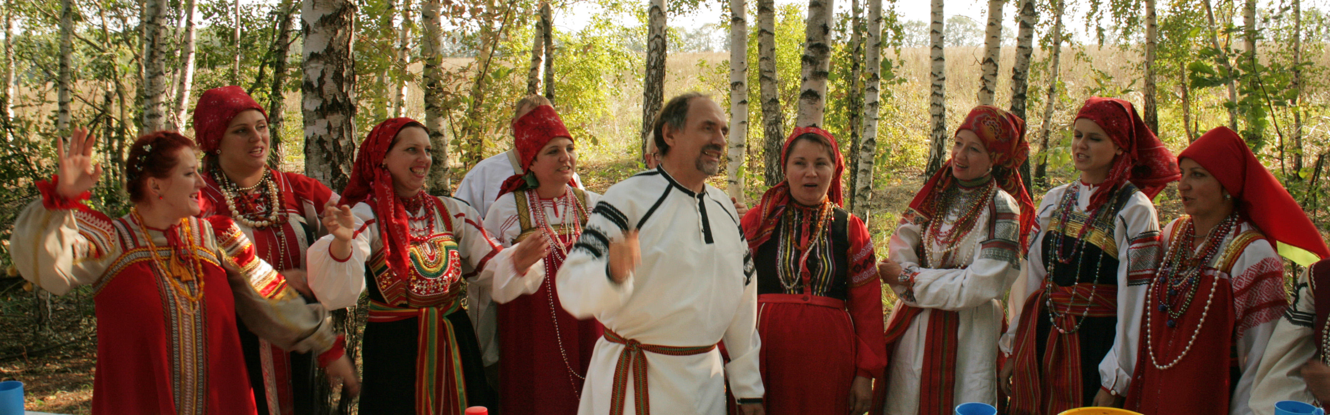 Ансамбль «Пересек». Открытие нового микрорайона родового экокопоселения «Кореньские родники». 15 сентября 2012 г. Белгородская область, Шебекинский район.